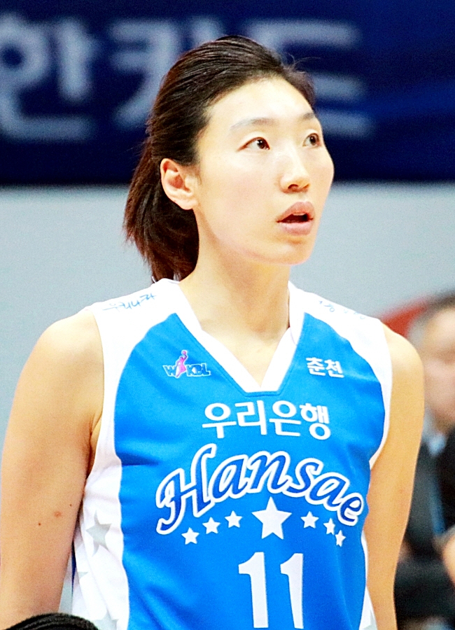 160101 여자농구 신한은행 vs 우리은행 직찍 1